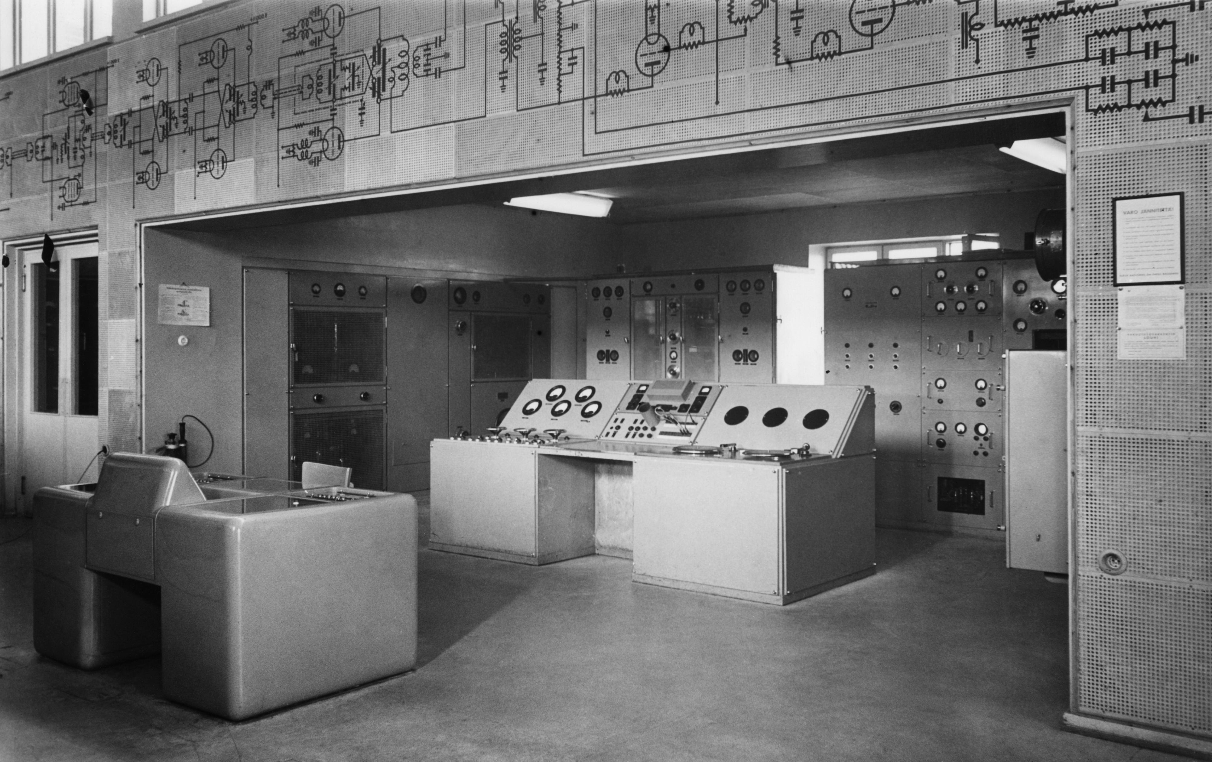 Yleisradion Porin lyhytaaltoasema, 1954. Seinäsyvennyksen vasemmassa reunassa on Lahdesta 1938 Poriin siirretty lyhytaaltolähetin, johon kuuluu myös isomman ohjauspöydän takana oleva osa peräseinän laitteistoa. Myös iso ohjauspöytä siirrettiin Poriin Lahdesta.